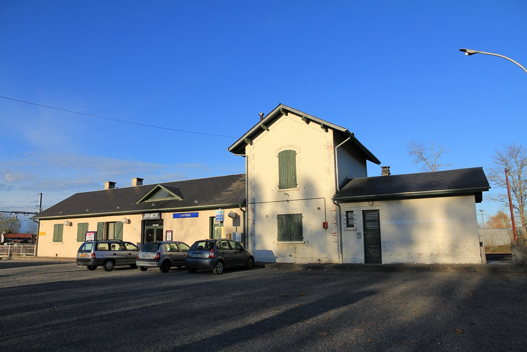 Vue du bâtiment-voyageurs de la gare de Capvern en novembre 2010, Hautes-Pyrénées, France.